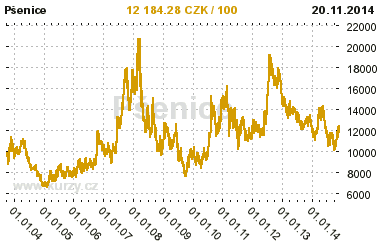 Kakao - Cena komodity.